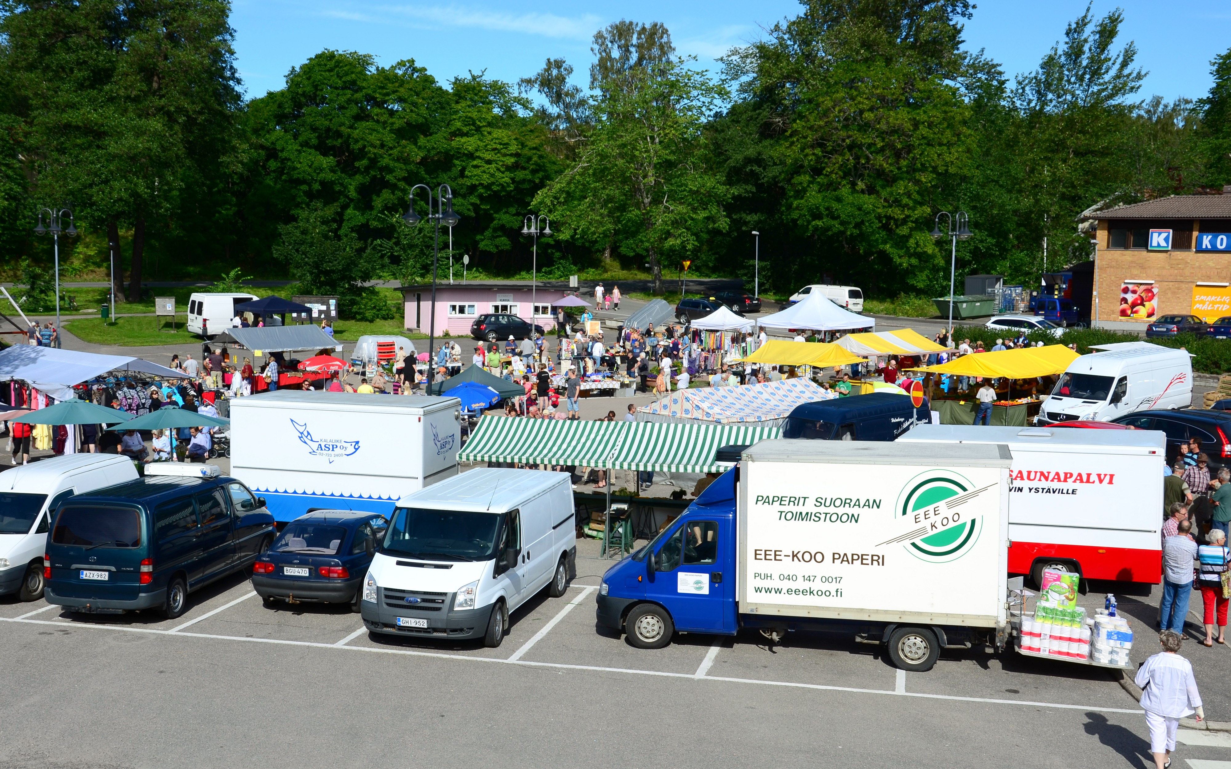 Torghandel i Dalsbruk, Finland.